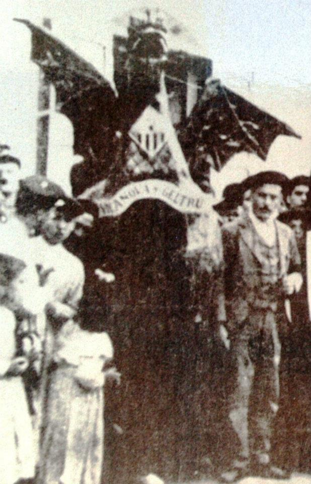 Fotografia del fons Joan Morera és la més antiga que coneixem del Drac de Vilanova. Data del 1902 i no en sabem gaire cosa més.